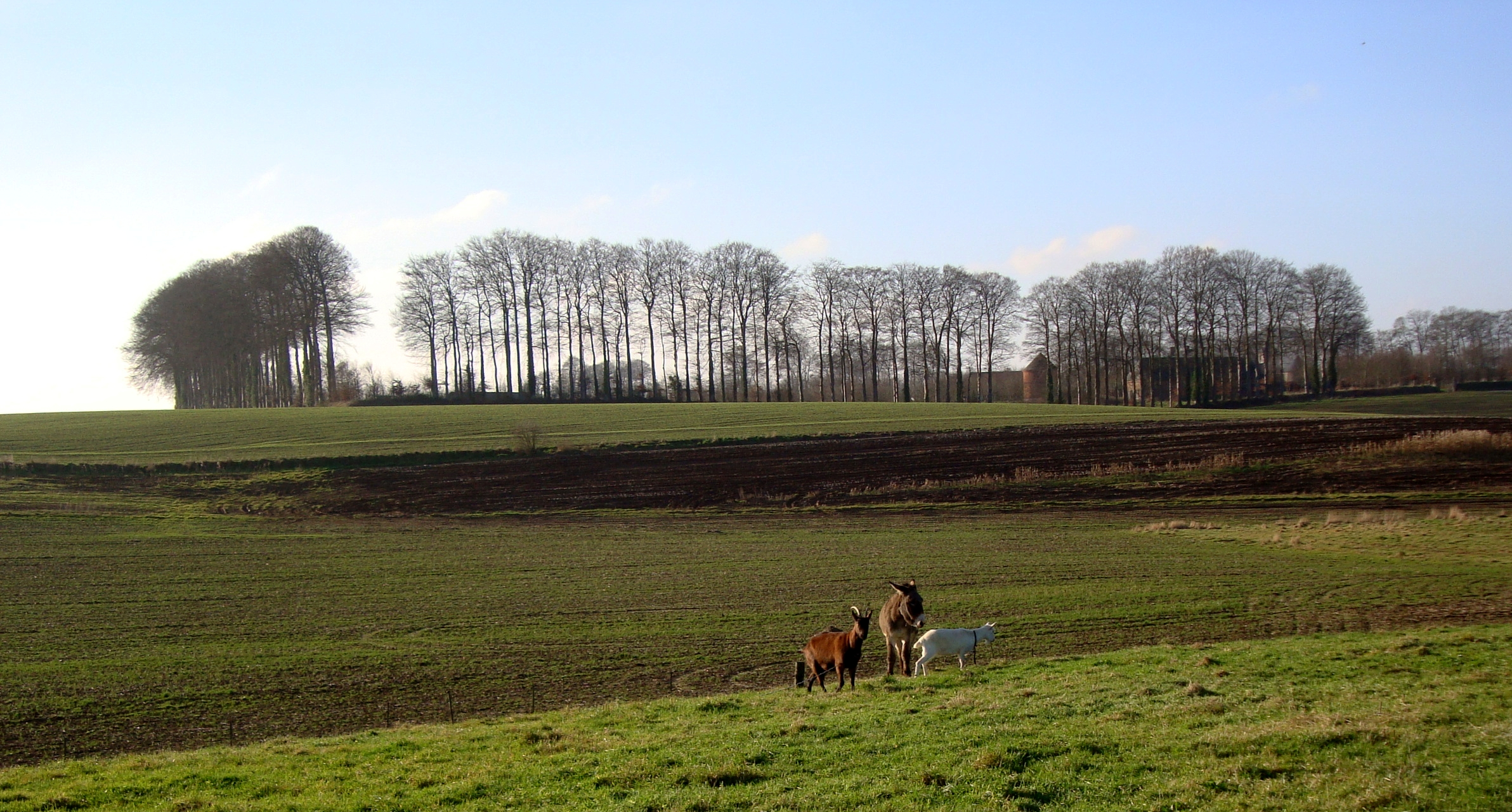 Le clos-masure du manoir de Vertot à Bennetot (Seine-Maritime), dans le Pays de Caux.